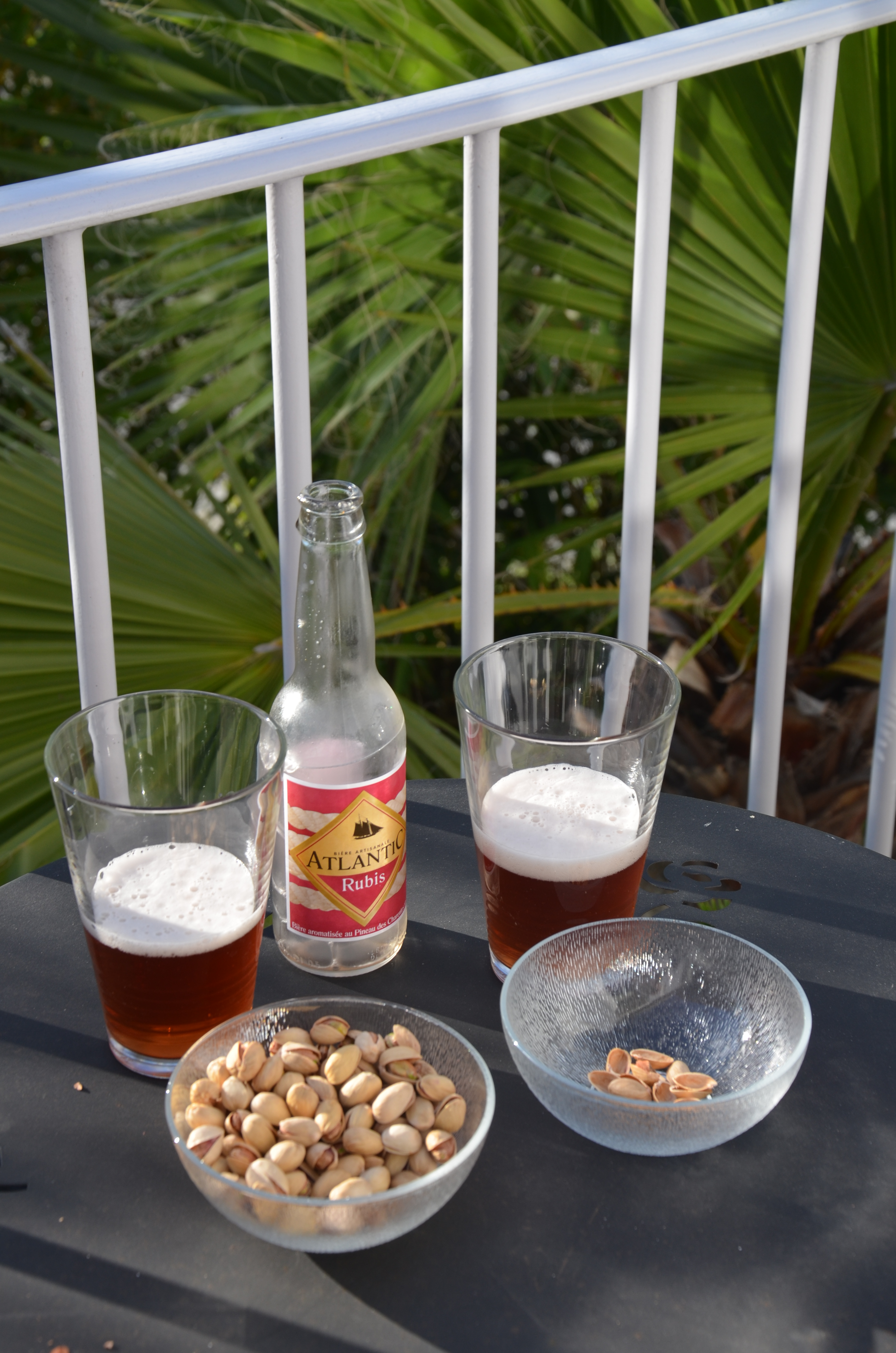 Apéritif à base de pistaches et de bière aromatisée au pineau des Charentes (Atlantic Rubis).